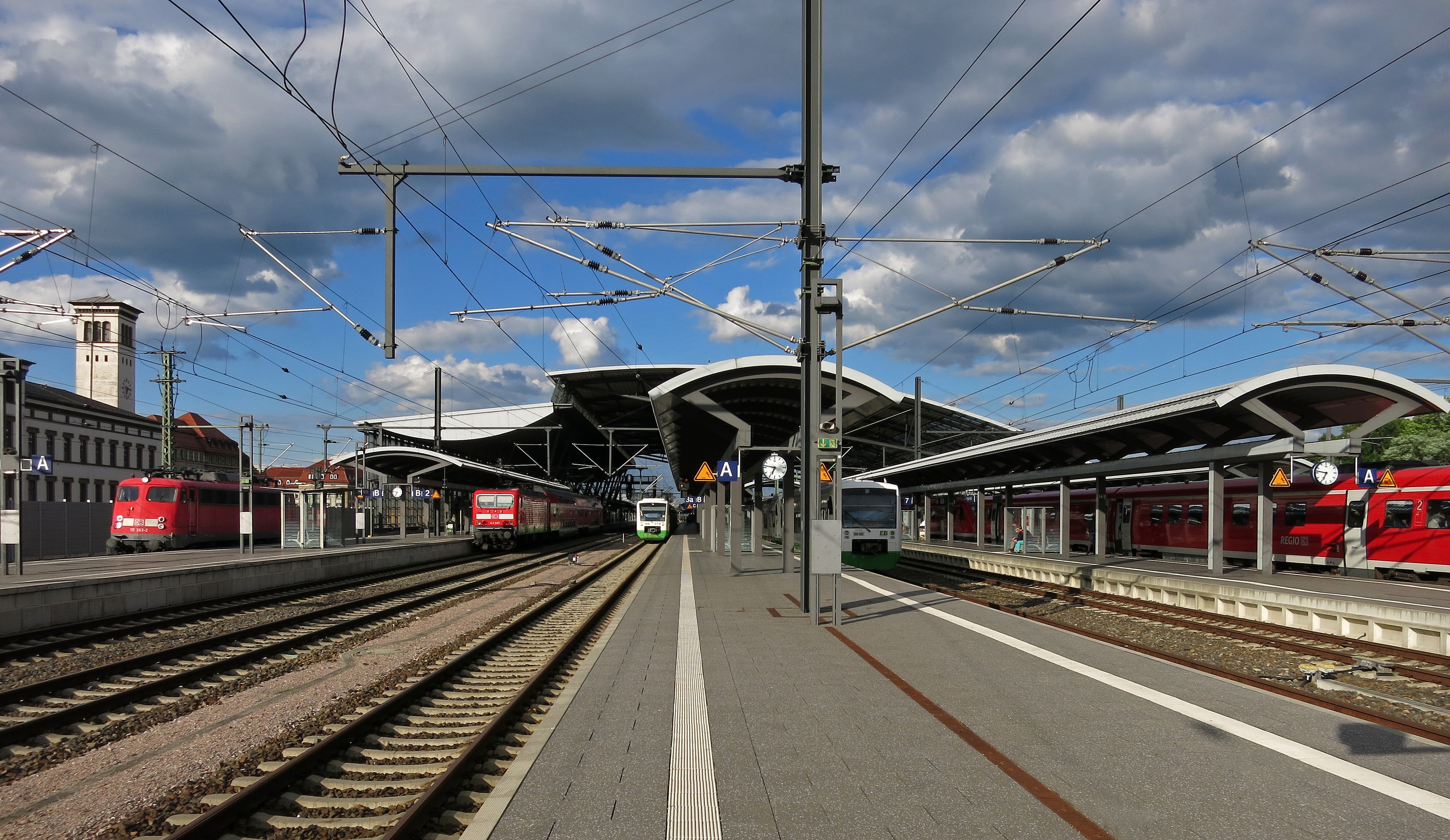 Panorama Erfurt Hbf.